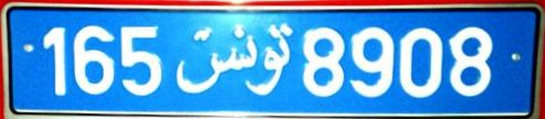 kentekenplaat uit Tunesië